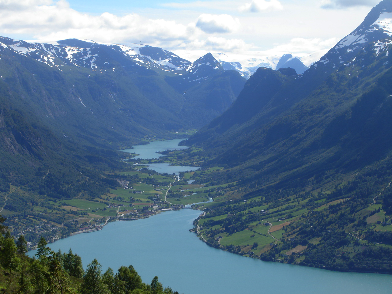 Olden in Oldedalen, bay Oldebukta in fjord Nordfjord in the front, lakes Floen and Oldevatnet behind